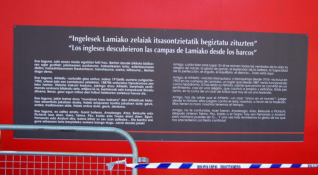 En mayo de 2009, el Ayuntamiento de Leioa (Vizcaya-España) celebró el 110 aniversario del Athletic Club de Fútbol, centrando sus actos en Lamiako, lugar elegido para jugar por el Athletic en sus primeros años de creación. Paneles explicativos, homenajes, murales, fueron los pilares de la conmemoración, pero tuvieron lugar lejos del lugar originario, las campas de Lamiako, donde el Athletic jugó sus primeros partidos, porque el espacio está pendiente de su destrucción por un proyecto de construcción de una macro depuradora de aguas fecales.